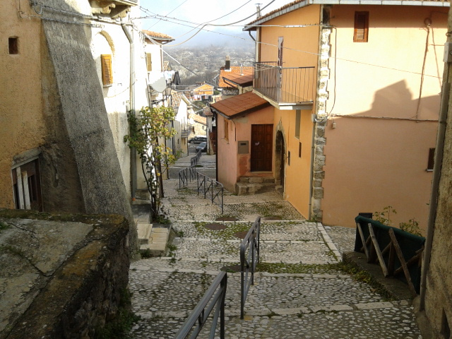 Scorcio fotografico di Verrecchie